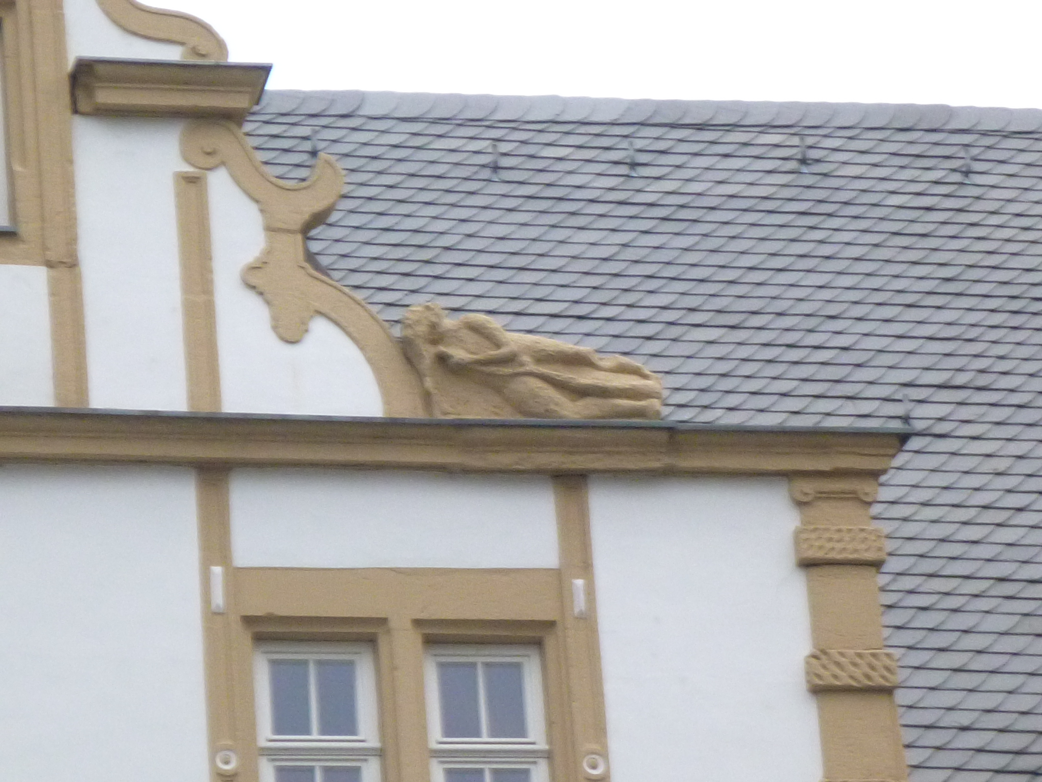 Denkmal für einen um 1700 ermordeten Dachdecker